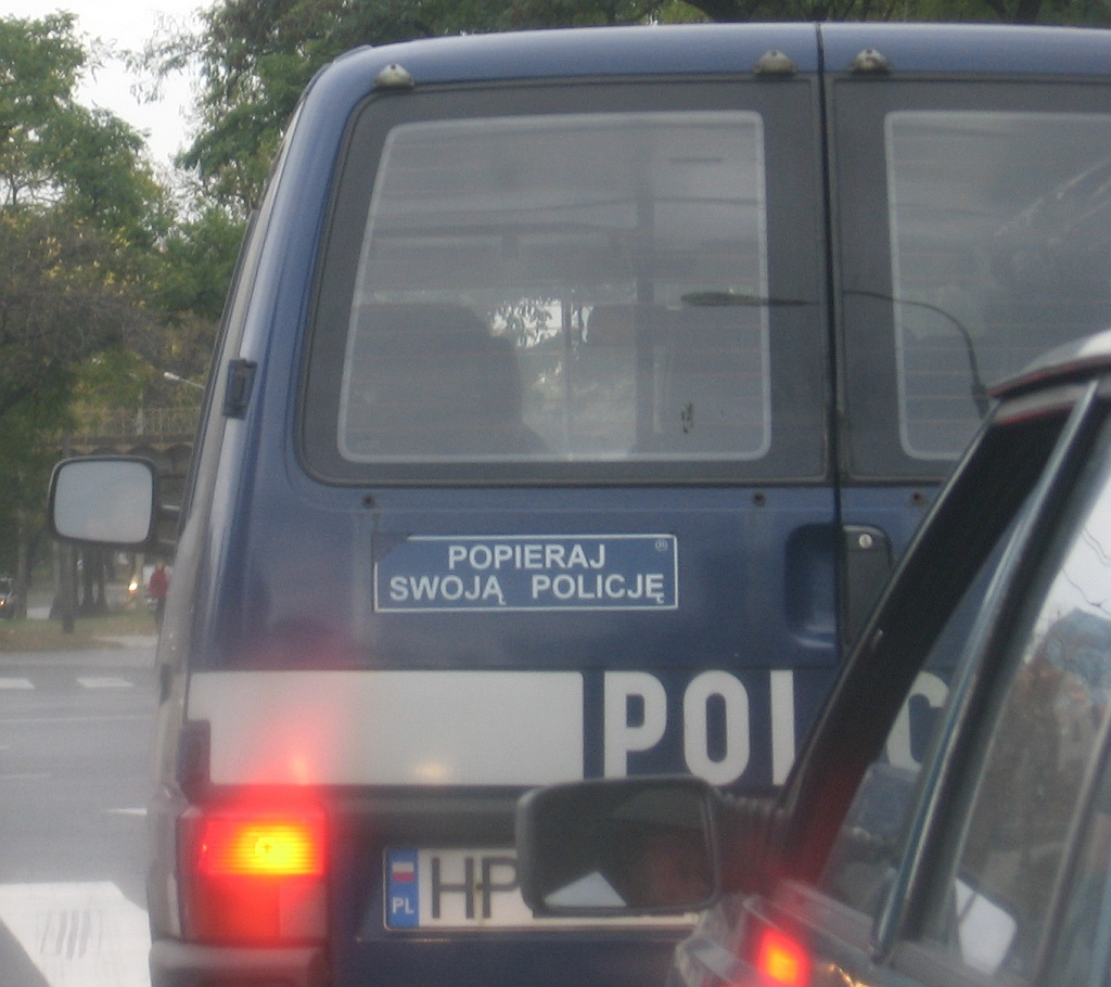 Poland: popieraj swoją policję = "support your police" label on police car